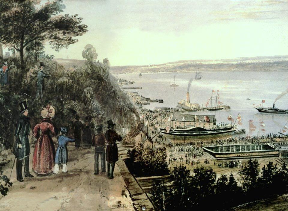 Le lancement du Royal William en 1831 Un exploit de classe mondial « Au moment de l’apparition des bateaux à vapeur, cette technologie n’était pas au point. C’est pourquoi ces navires étaient toujours munis de mats et de voiles. De cette façon, si le système ne répondait plus, on revenait à la bonne vieille méthode. Probablement le plus célèbre de ces bateaux-hybrides a été le Royal William. Construit à Québec, au Cap-Blanc, dans le chantier de George Black et de John Saxton Campbell, il est lancé le 27 avril 1831 en présence du gouverneur lord Aylmer et d’une foule imposante: un congé public avait été décrété pour l’occasion. Ce bateau est devenu l'un des plus célèbres de l'histoire mondiale de la navigation. En effet, il a été le premier à avoir traversé l’Atlantique Nord à l’aide de la vapeur seulement, sans l'aide de ses voiles. Parti de Pictou en Nouvelle-Écosse le 18 août 1833, il a mis 25 jours pour atteindre Gravesend sur la Tamise, situé à environ 80km à l'est de Londres. Sur l'aquarelle ayant immortalisé ce moment, le Royal William se trouve au nord de la cale sèche de la Canada Floating Dock. Il apparaît sans ses mâts et on aperçoit ses deux roues à aubes latérales. Et ce bateau mémorable a été construit chez nous, à Québec. » - Société historique de Québec